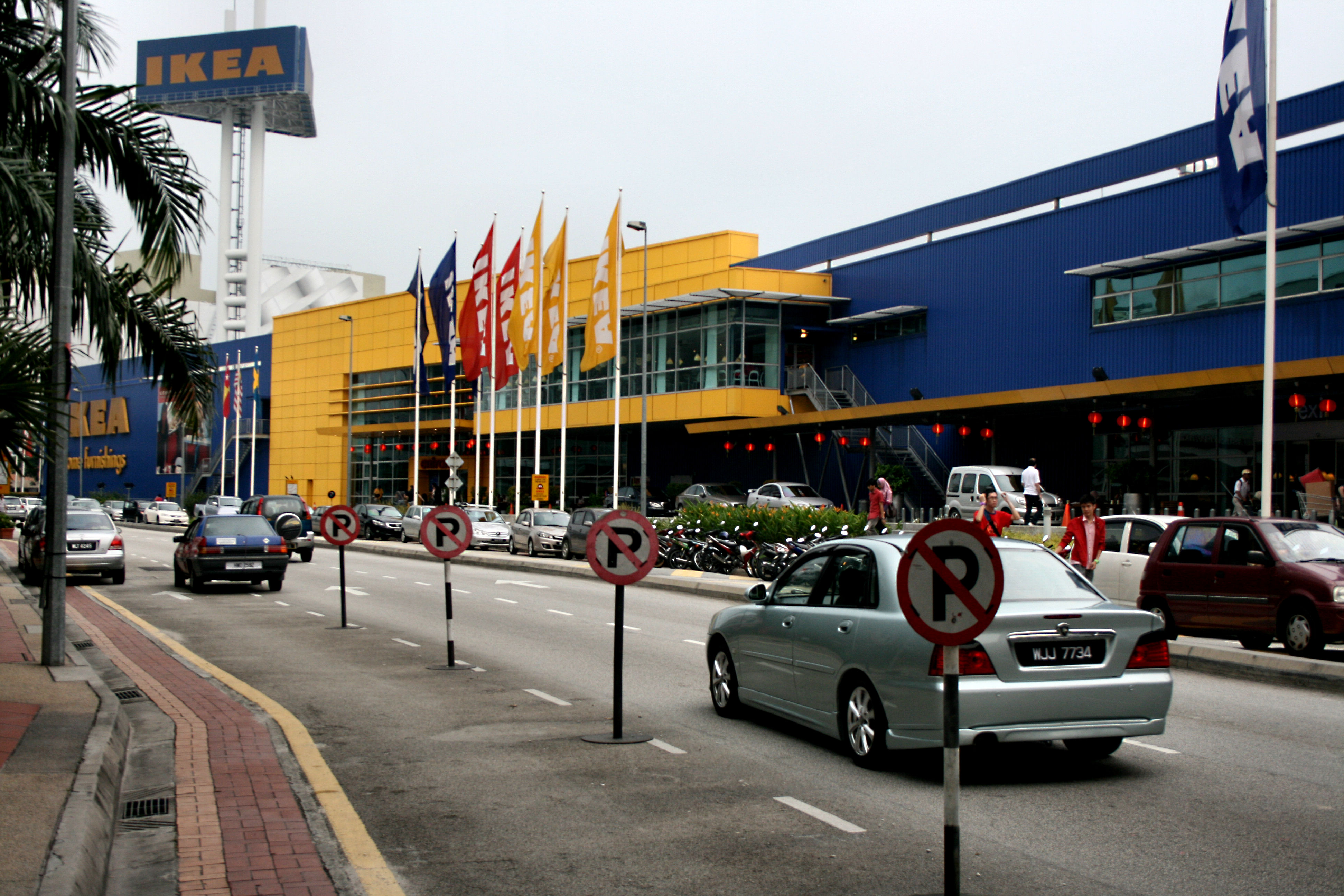 Ikea Malaysia Facade